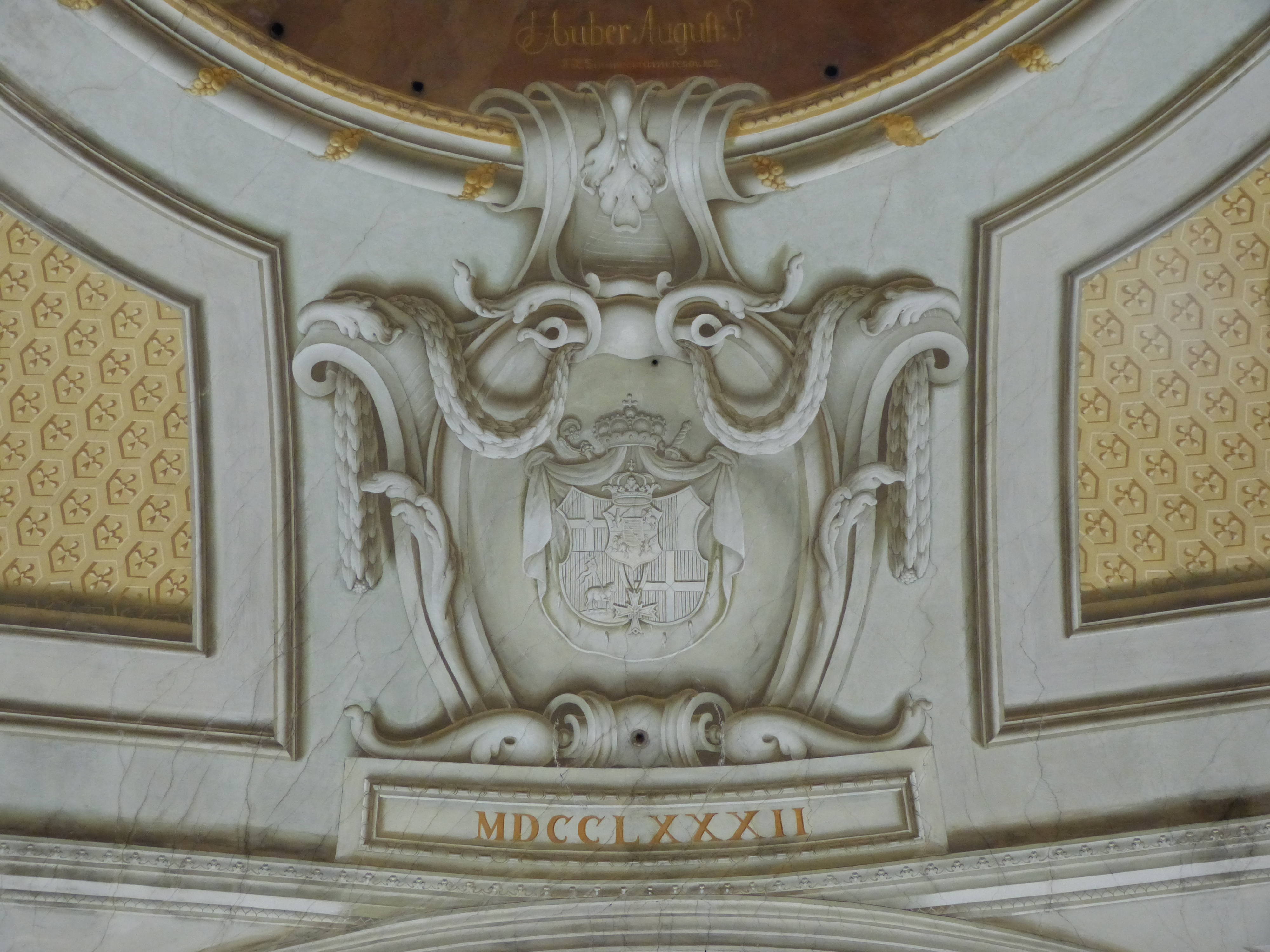 St. Stephan, Pfaffenhausen, Landkreis Unterallgäu, Bayern; Wappen des Clemens Wenzeslaus von Sachsen (Bischof von Augsburg) Hauptschild: Feld 1 und Feld 4: Kurtrier, Fürstbistum Trier. Feld 2: Fürstbistum Augsburg. Feld 3: Fürstabtei Prüm (sog. Prümer Lamm). Mittelschild: Wappen als Prinz von Polen (Polen hatte Litauen annektiert, darüber die Königskrone) Felder 1 und 4: Königreich Polen. Felder 2 und 3: Großherzogtum Litauen. Herzschild: Sachsen